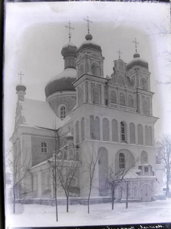 Беларуская (тарашкевіца): Магілёў (Mahiloŭ), Падмікольле (Padmikolle). Мікольскі манастыр